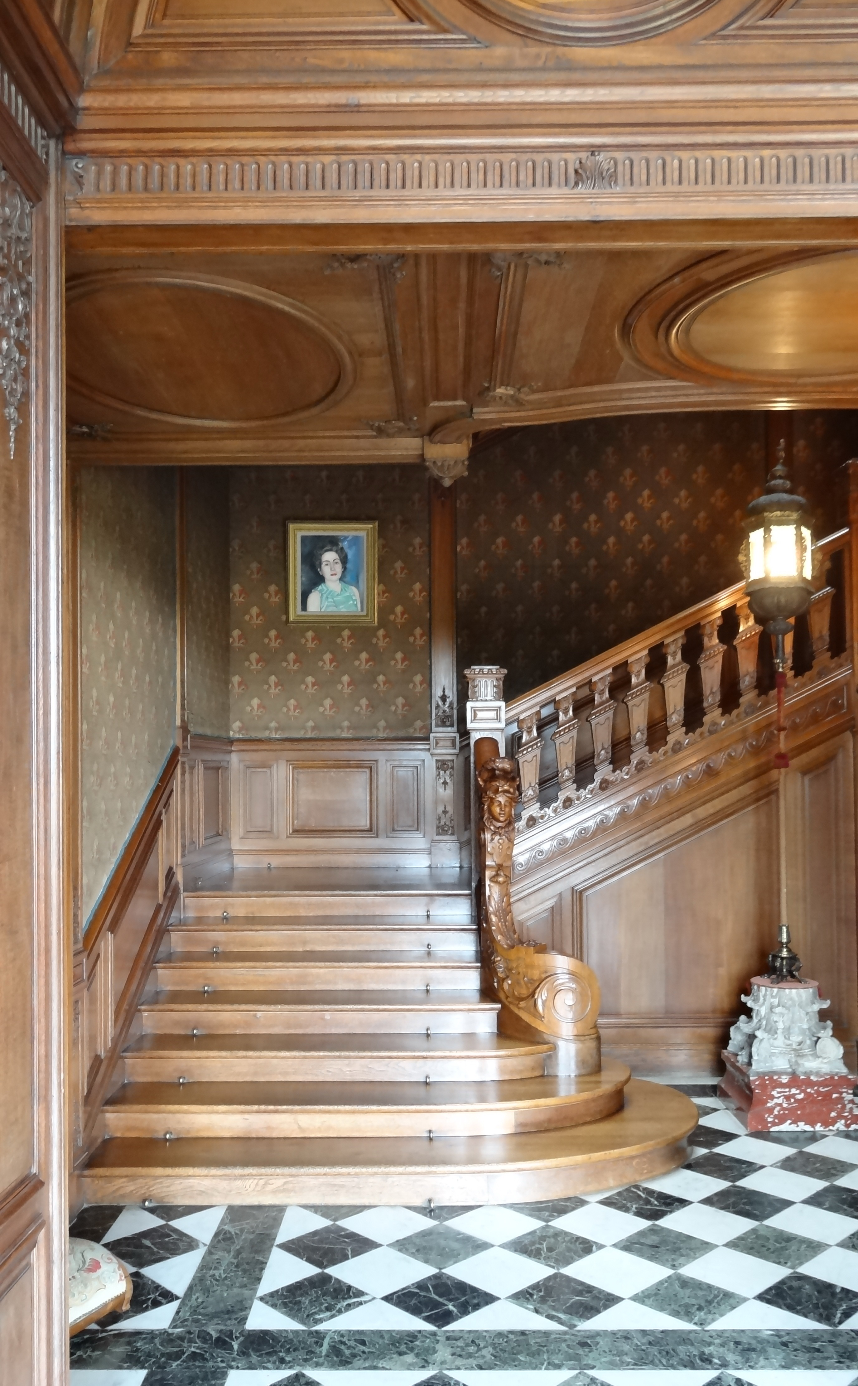 Intérieur du Château de Bizy (Vernon, Normandie)